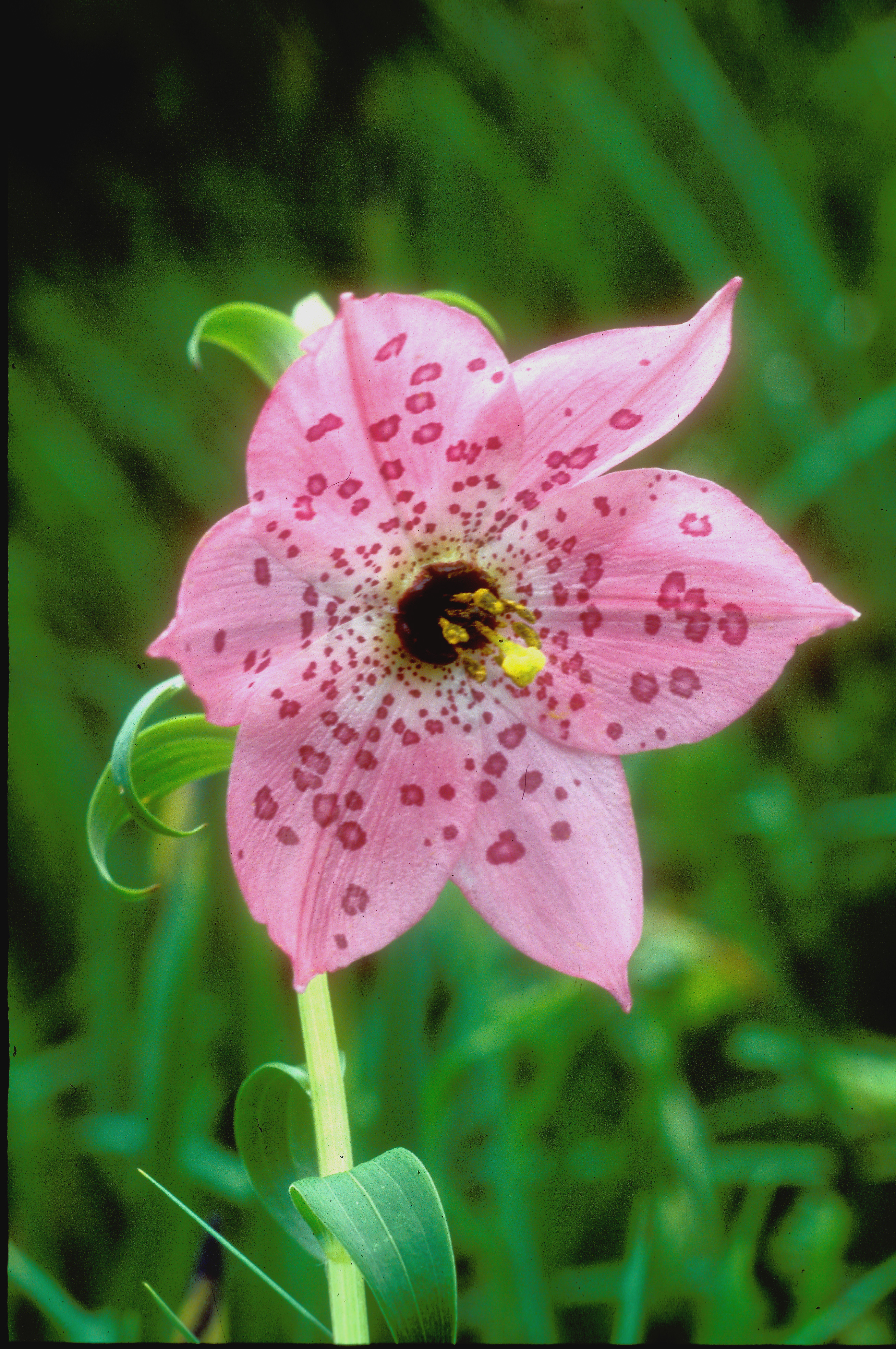 Nomocharis aperta in habitat, Napa Hai, Yunnan, China